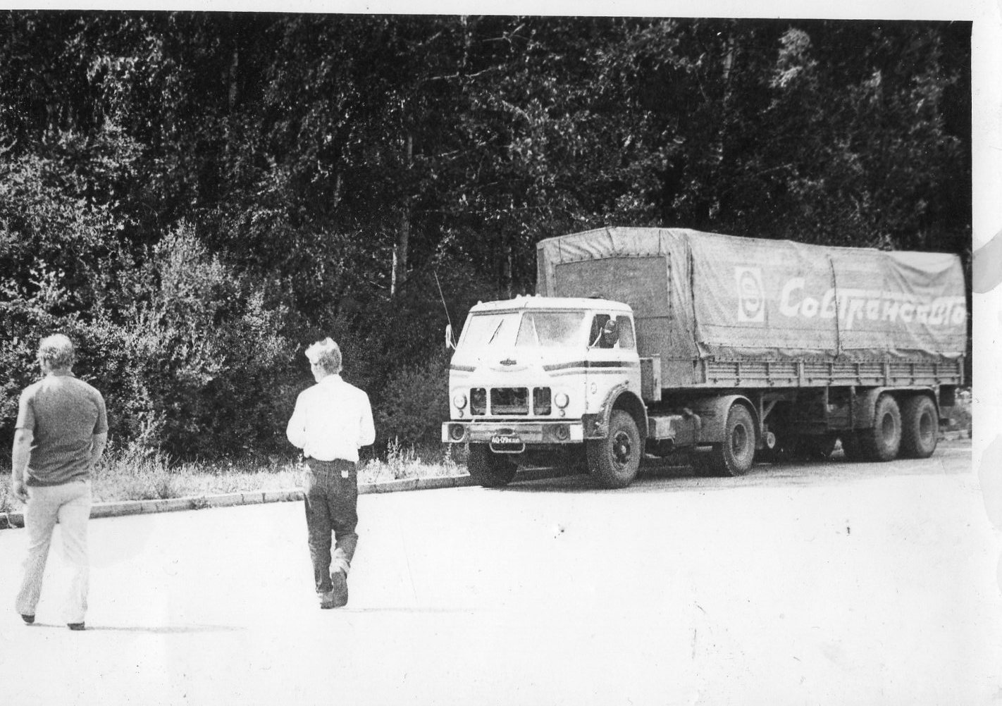 MAZ 504V 80ndate algul Venemaal.